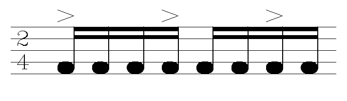 Tuada rhythm model